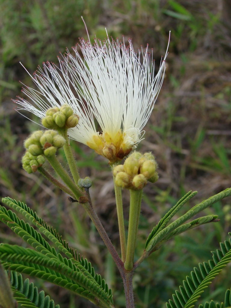 Calliandra viscidula - FABACEAE Chapada Diamantina - Parque Natural Municipal Morro do Pai Inácio - Palmeiras - Bahia - Brasil.